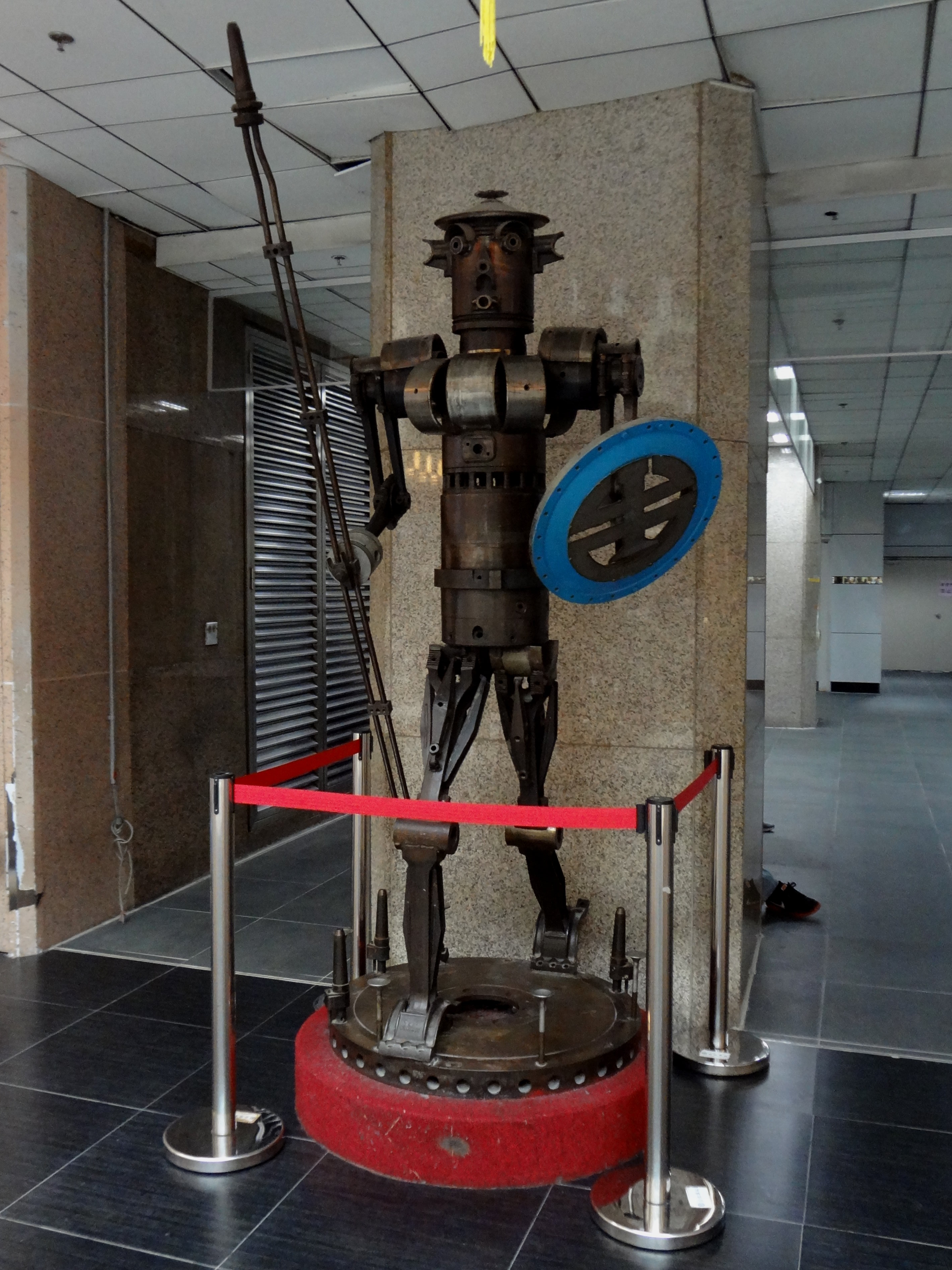 中文（台灣）: 臺北車站1樓大廳設置的臺鐵機器人。